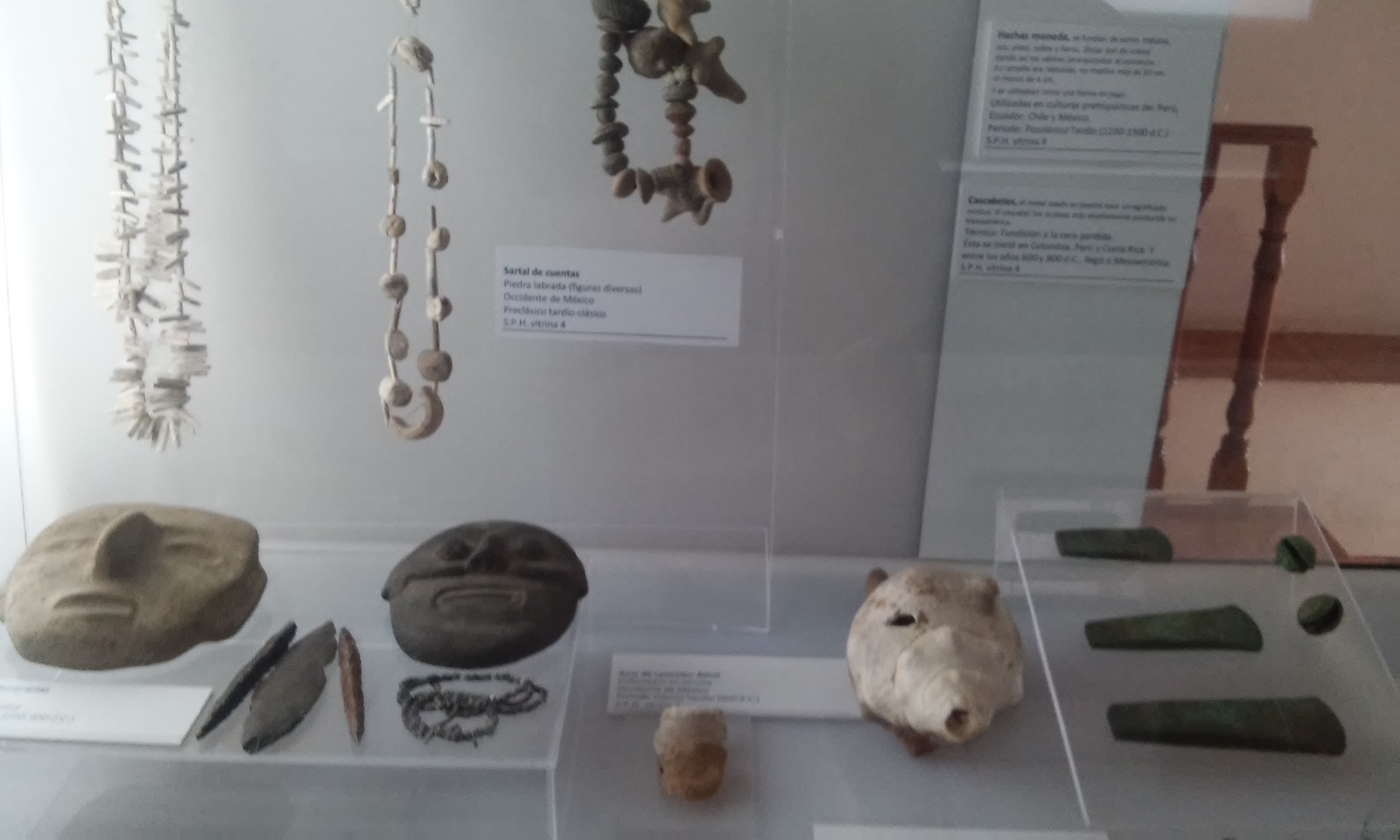 Artesania prehispanica de Tepatitlan